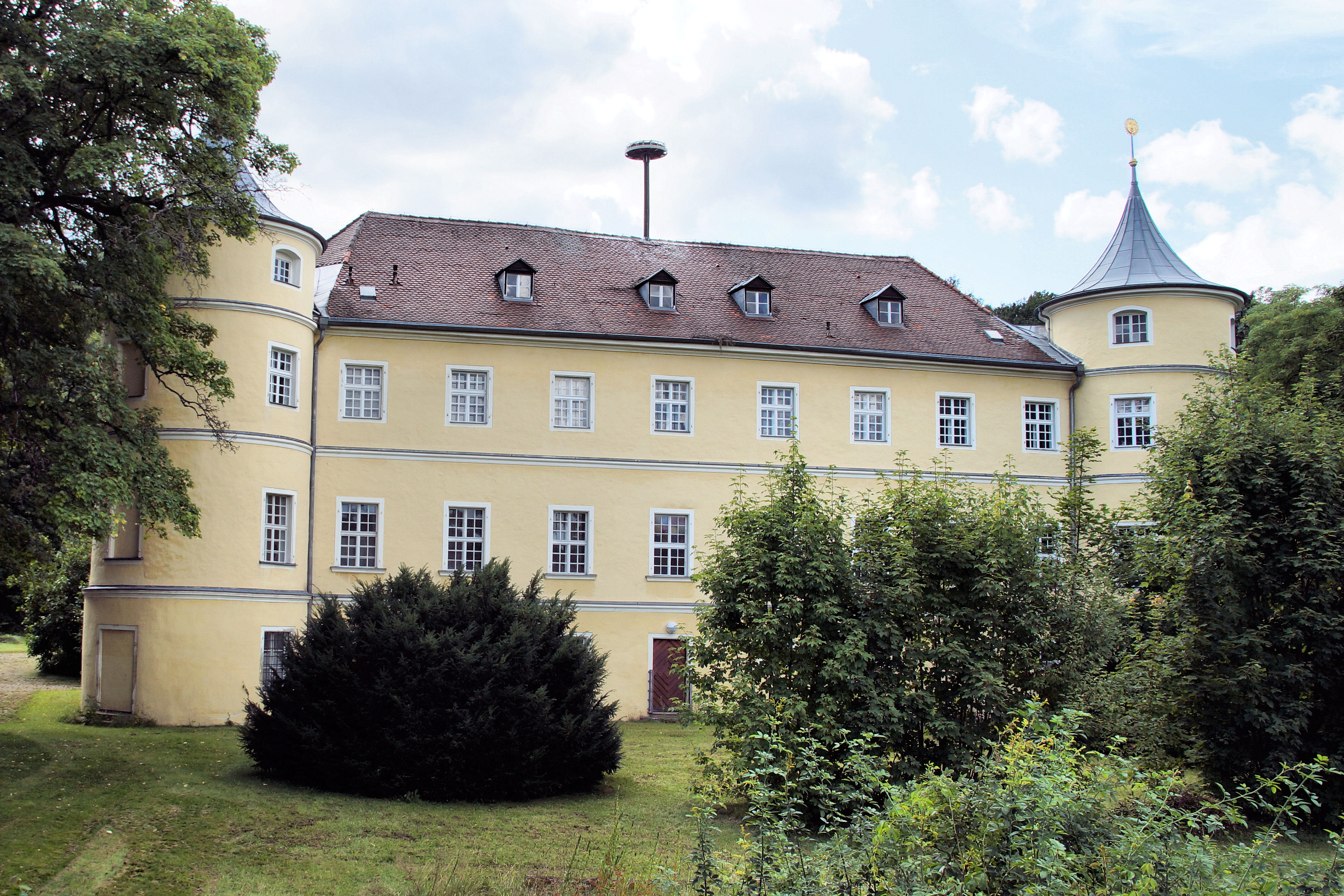 Schloss Regendorf, Hauptgebäude, dreigeschossiger Walmdachbau über H-förmigem Grundriss, mit Ecktürmen am Ostflügel und Gartentreppe, im Kern 1515, Umbauten und Aufstockung 1840.